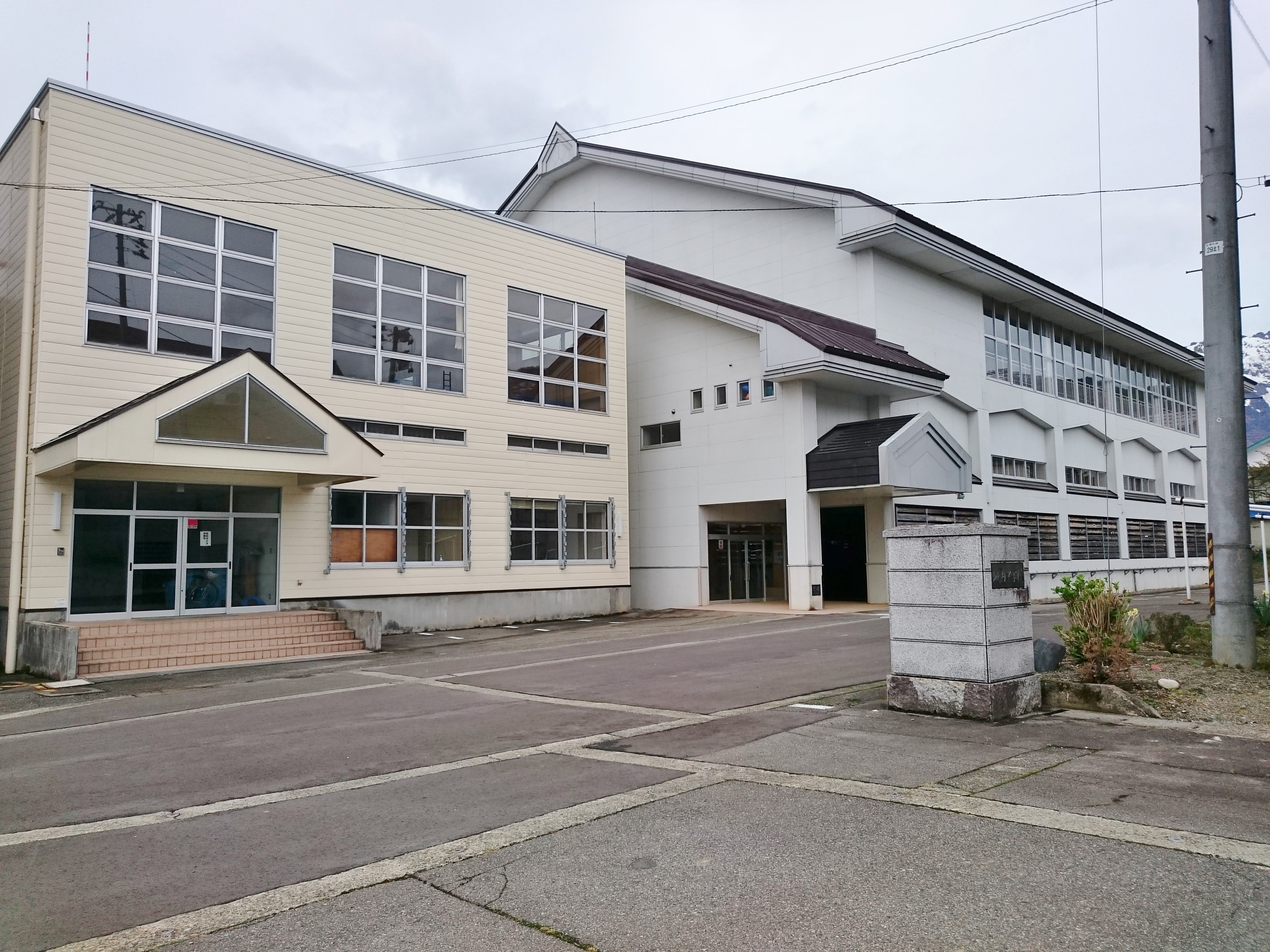 南魚沼市立城内中学校の体育館